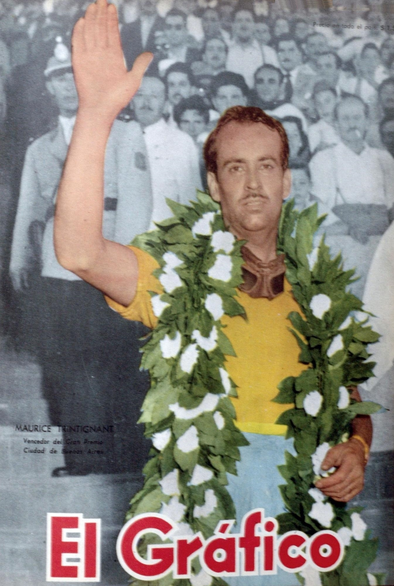 El Grafico del 12 de Febrero de 1954. Edicion 1801